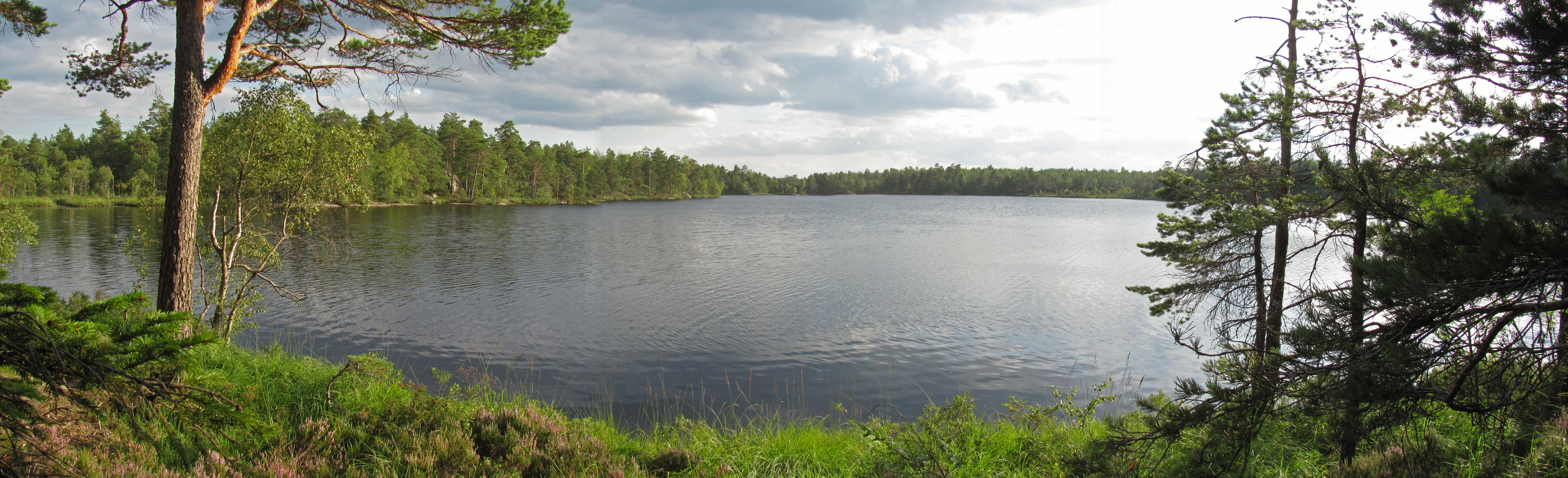 Långsjön, Hanveden